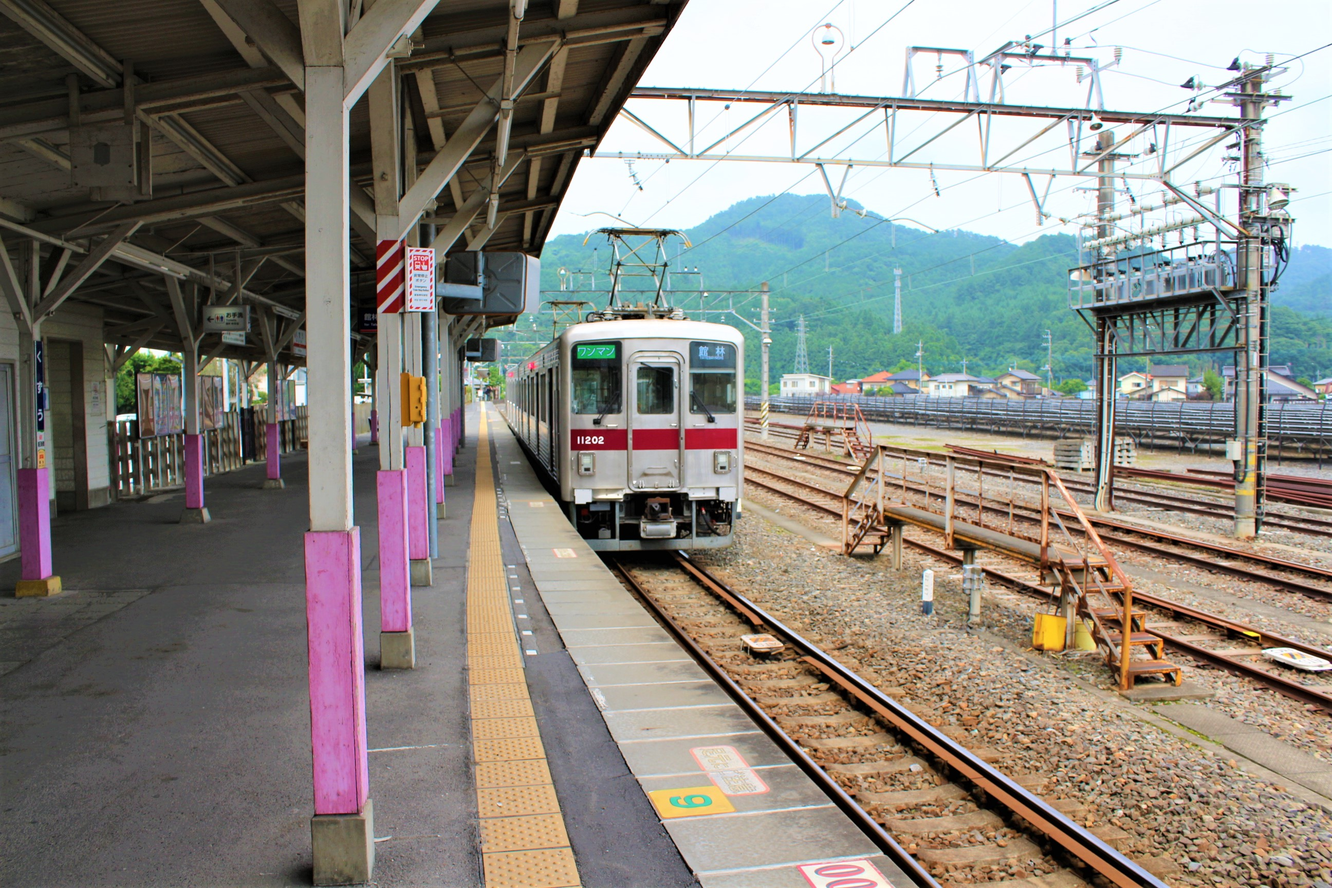 葛生駅ホーム Canon EOS Kiss X7i